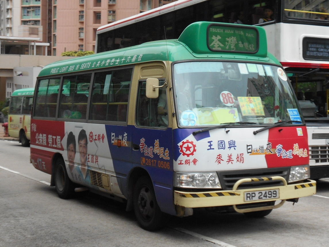 中文（香港）: 新界專線小巴86線，正準備駛入石籬梨貝街總站